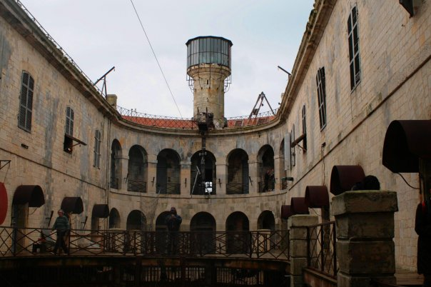 Fort Boyard coté sud